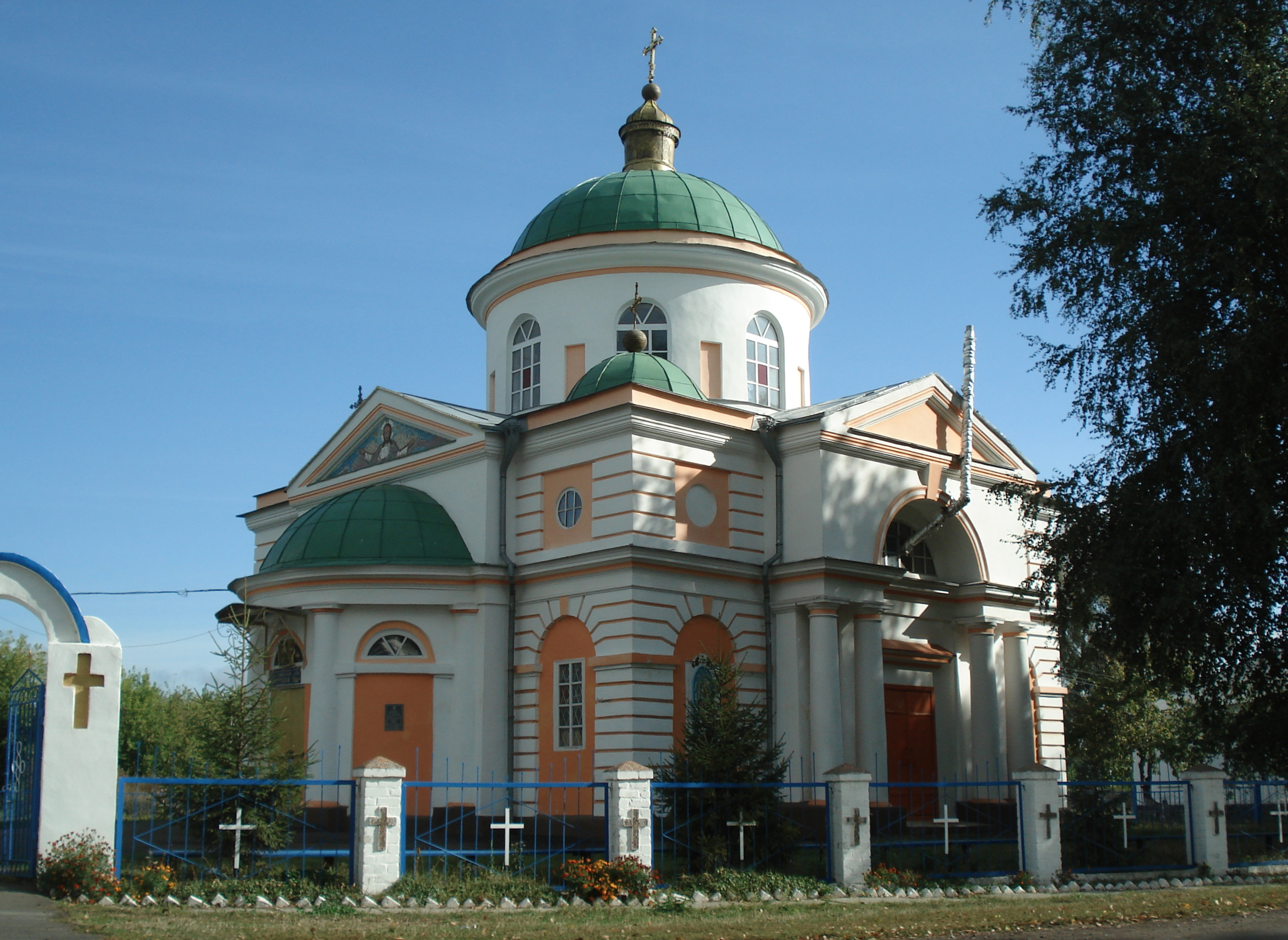 Церква у селі Вознесенське (Жовтневе) Згурівського району Київської області